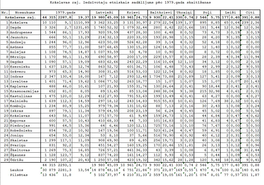 Latvijas 1979. gada tautas skaitīšanas dati